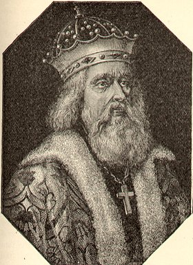 Alexander Nevsky